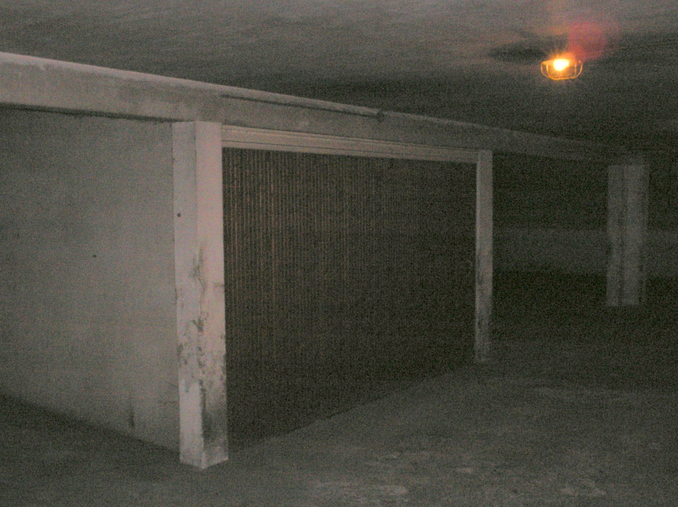 Box d'un garage souterrain